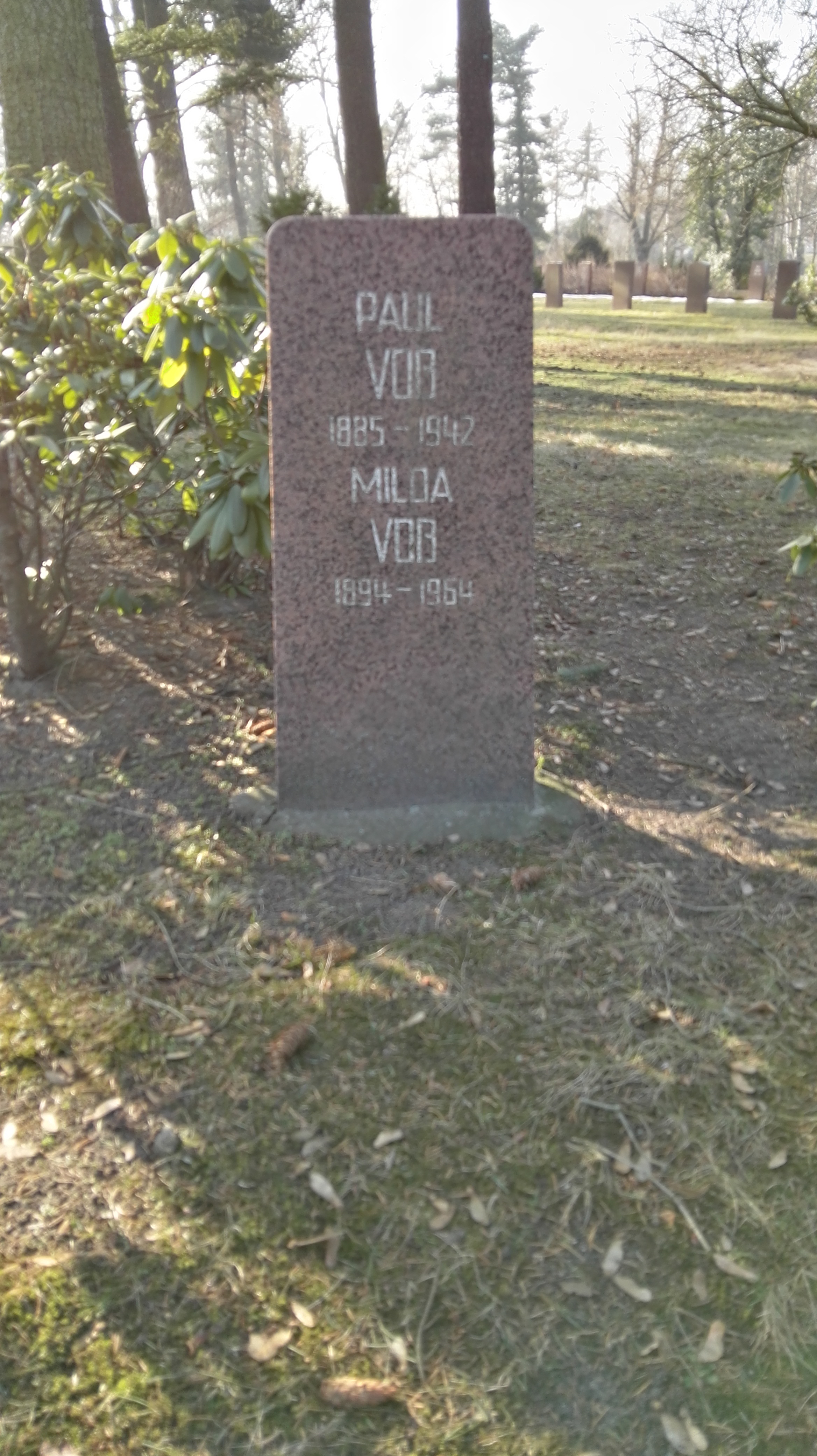 Grab von Milda Voß und Paul Voß in der Grabanlage Pergolenweg auf dem Sozialistenfriedhof des Zentralfriedhofs Friedrichsfelde